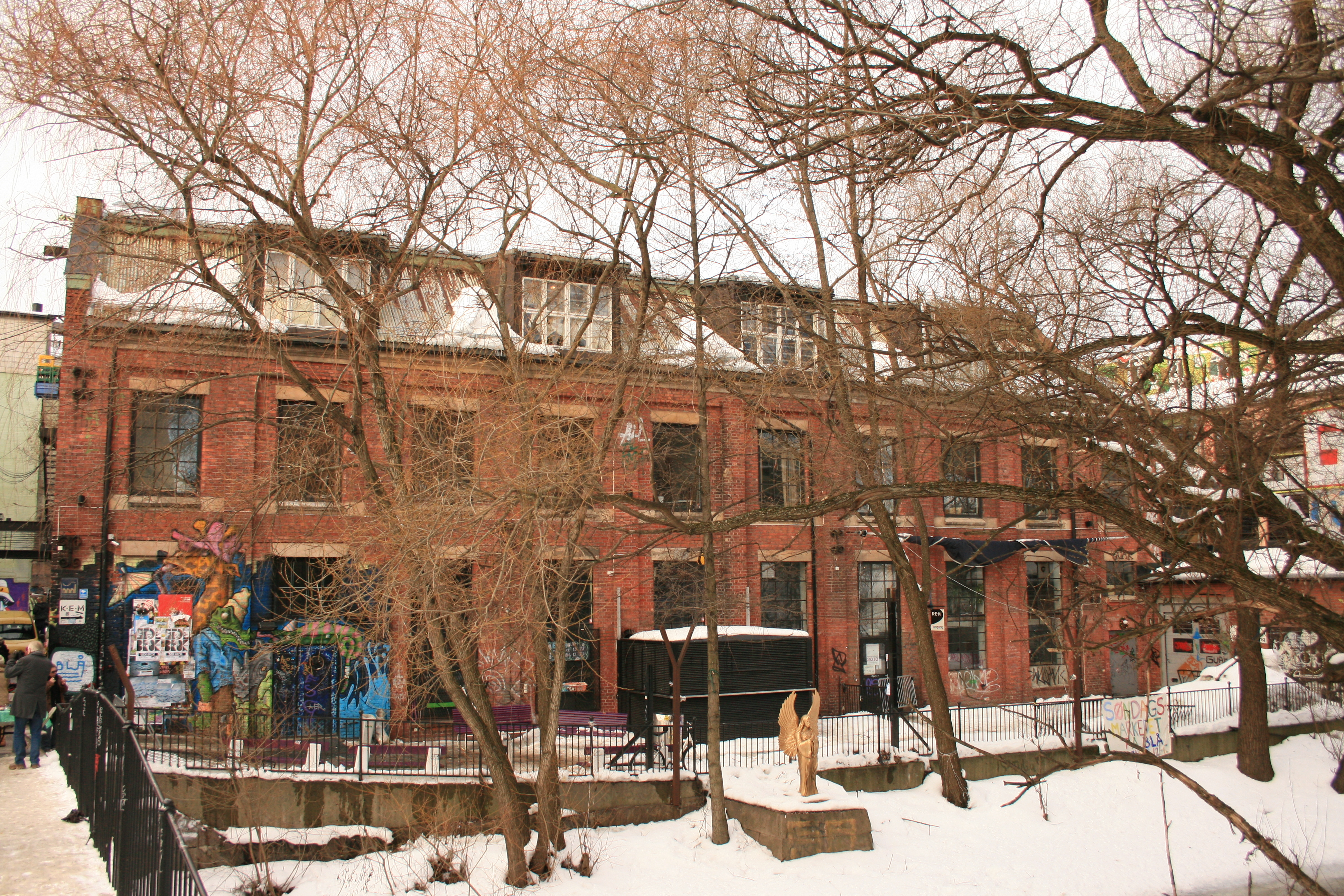 Blå er et konsert- og skjenkested i Oslo. Det ligger i en gammel industribygning i Brenneriveien 9 ved Akerselva.